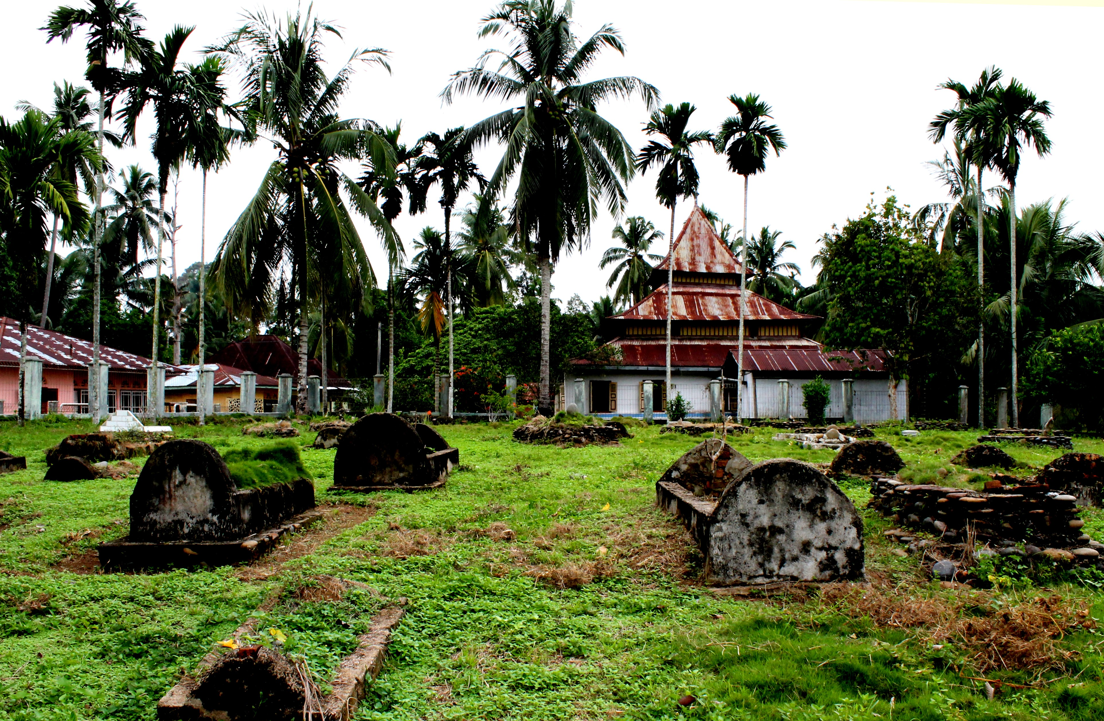 Pesona Makam Raja-Raja Siguntur, Dharmasraya, Provinsi Sumatera Barat